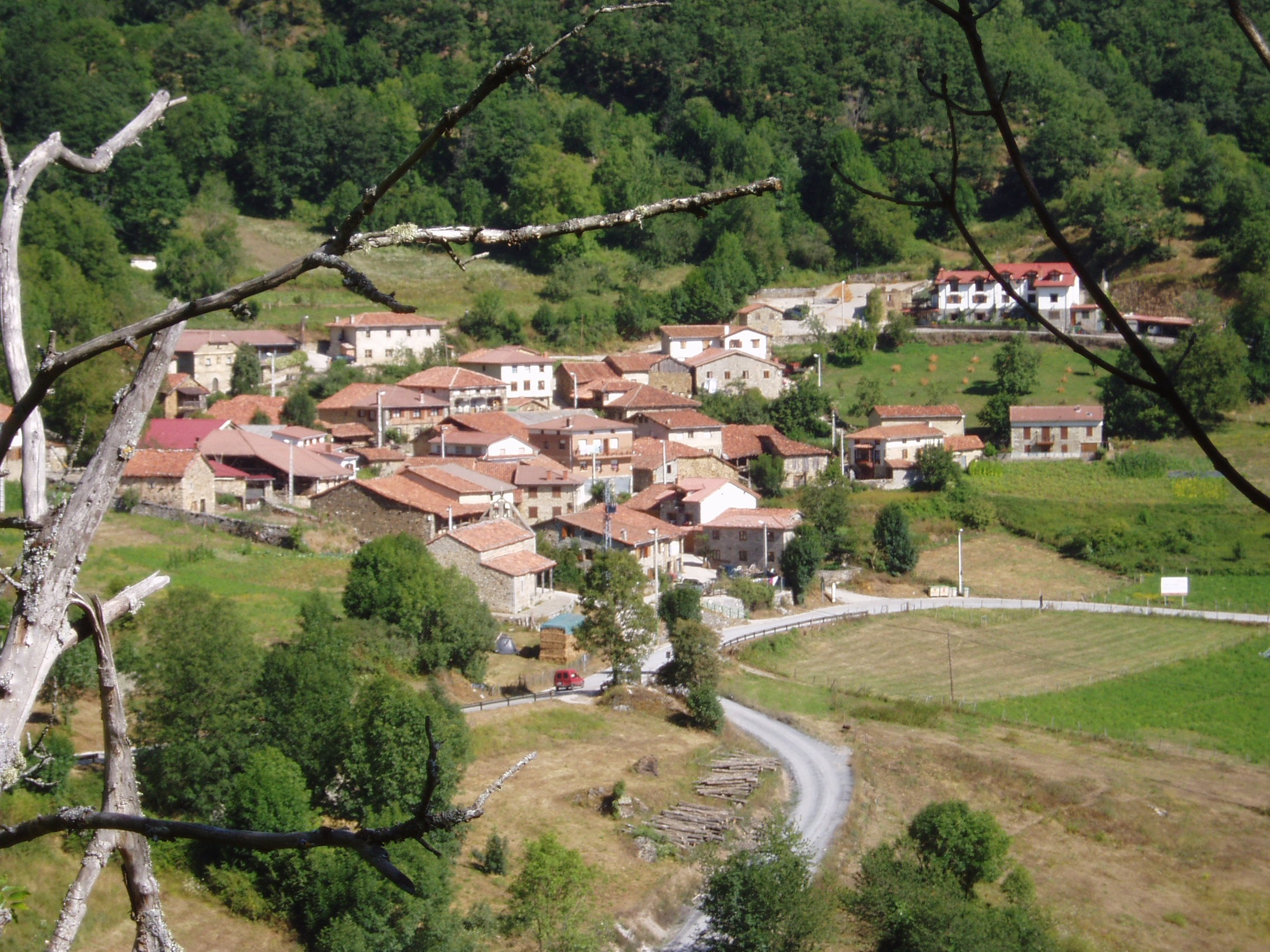 Dobres. Liébana. Cantabria. España